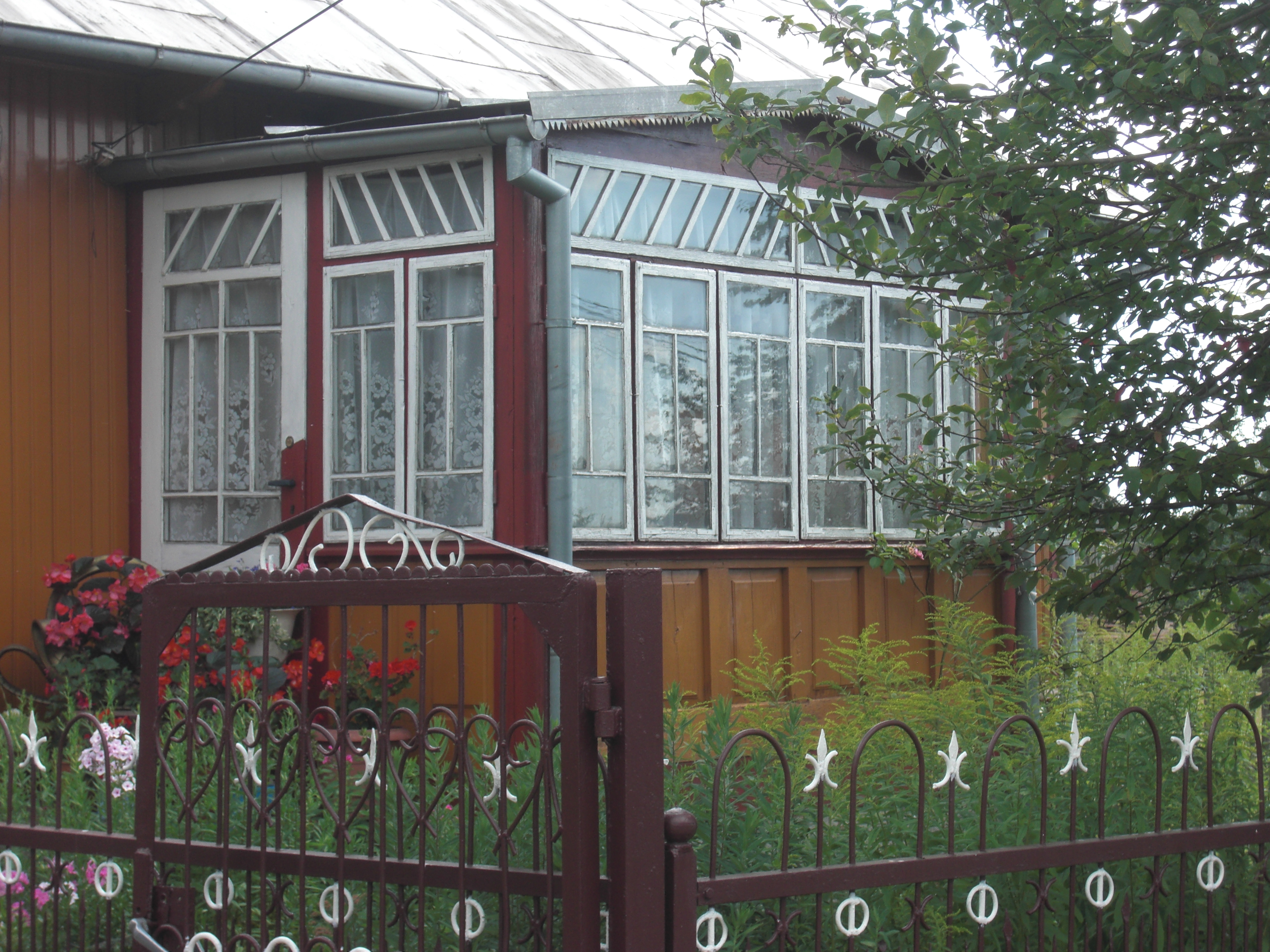 Wieś Grabowiec